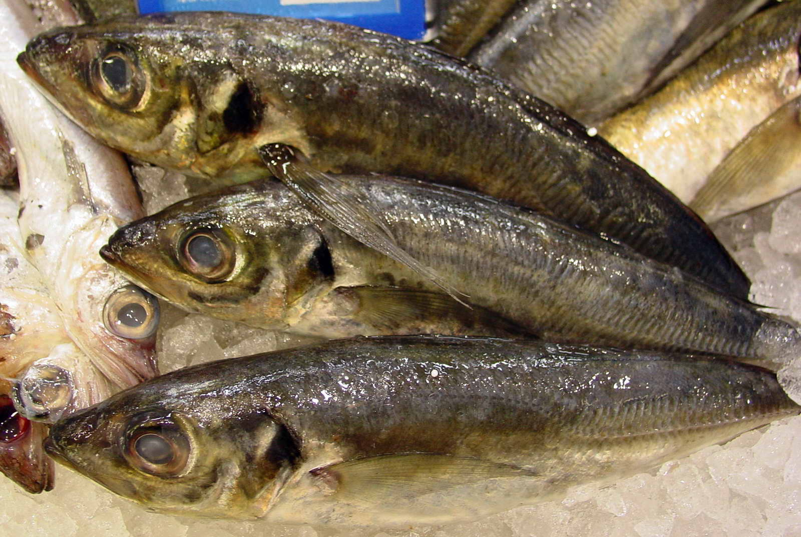 Trachurus trachurus